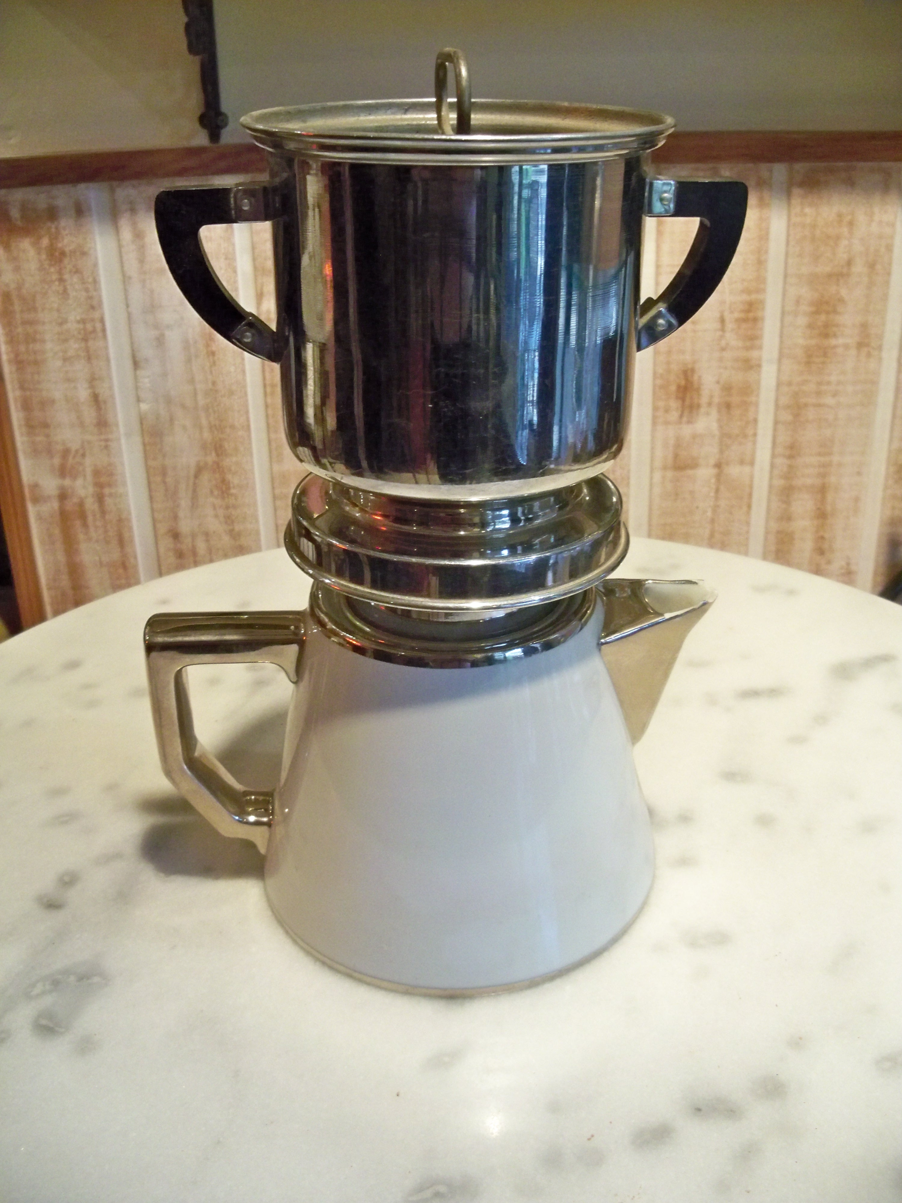 Cafetière